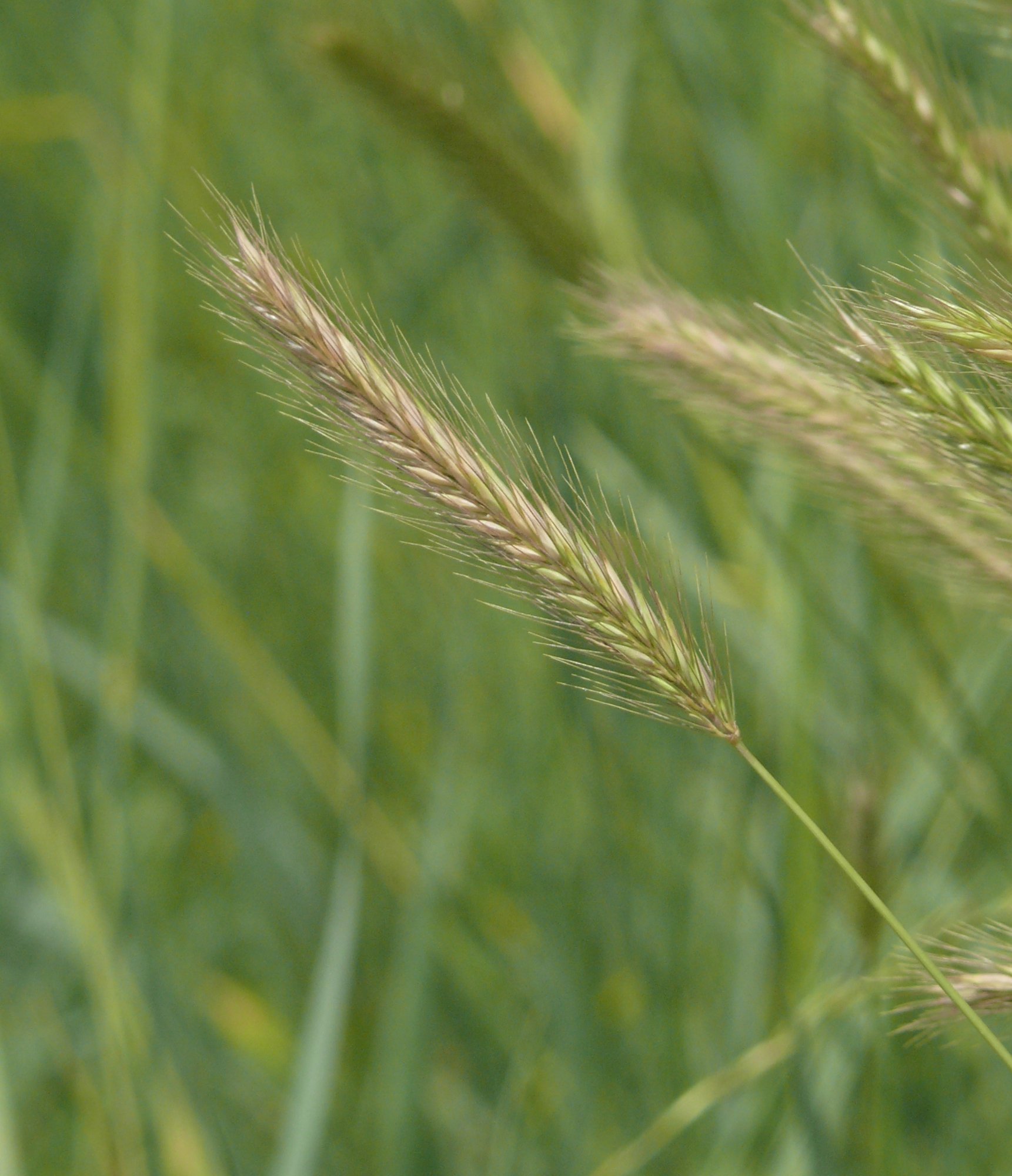 Hordeum secalinum, Hohenlohe